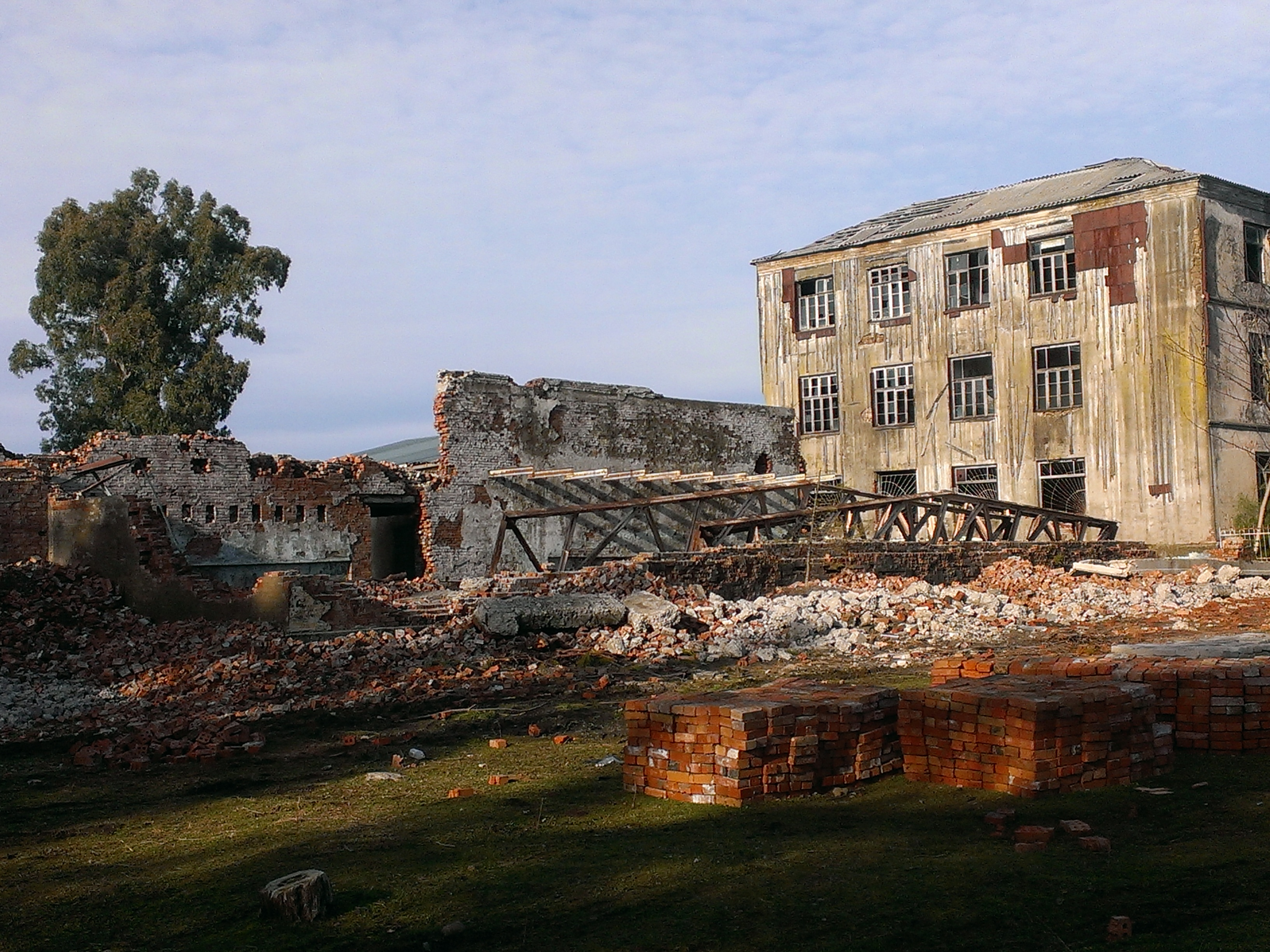 კულტურის სახლის ნანგრევები